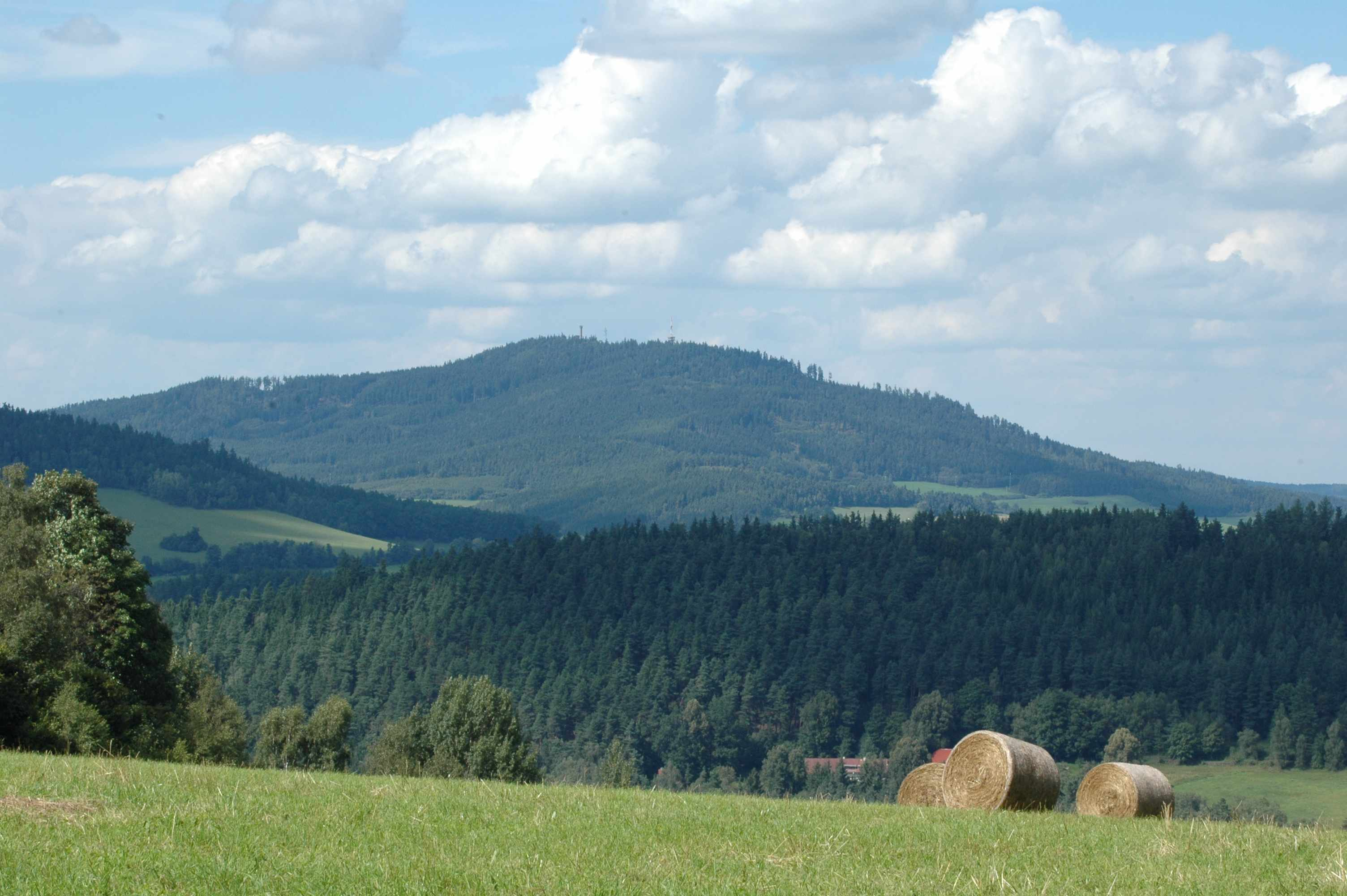 Rozhledna Svatobor nad Sušicí, foceno od Hartmanic